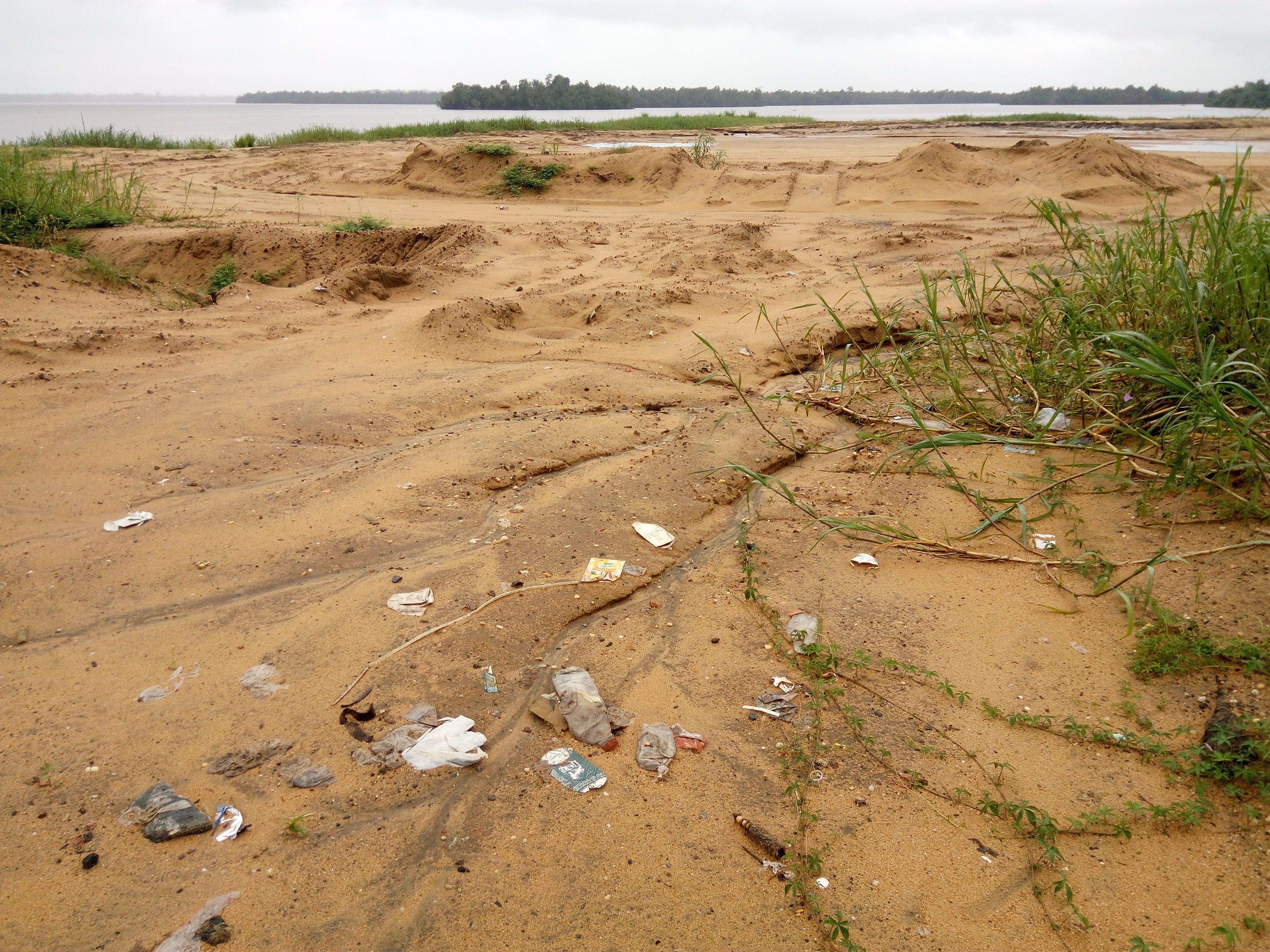 Au bord du Wouri. Cette plage de sable est le nouveau site du Ngondo.